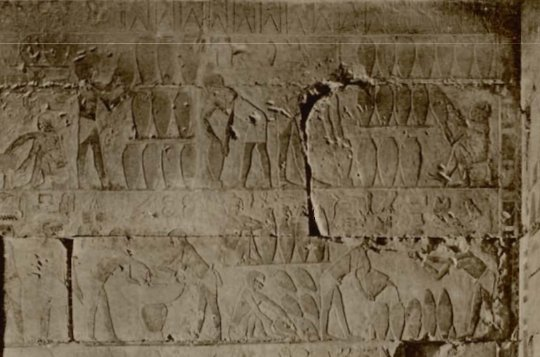 Szene der Bierproduktion in der Mastaba des Ti (Altes Reich)